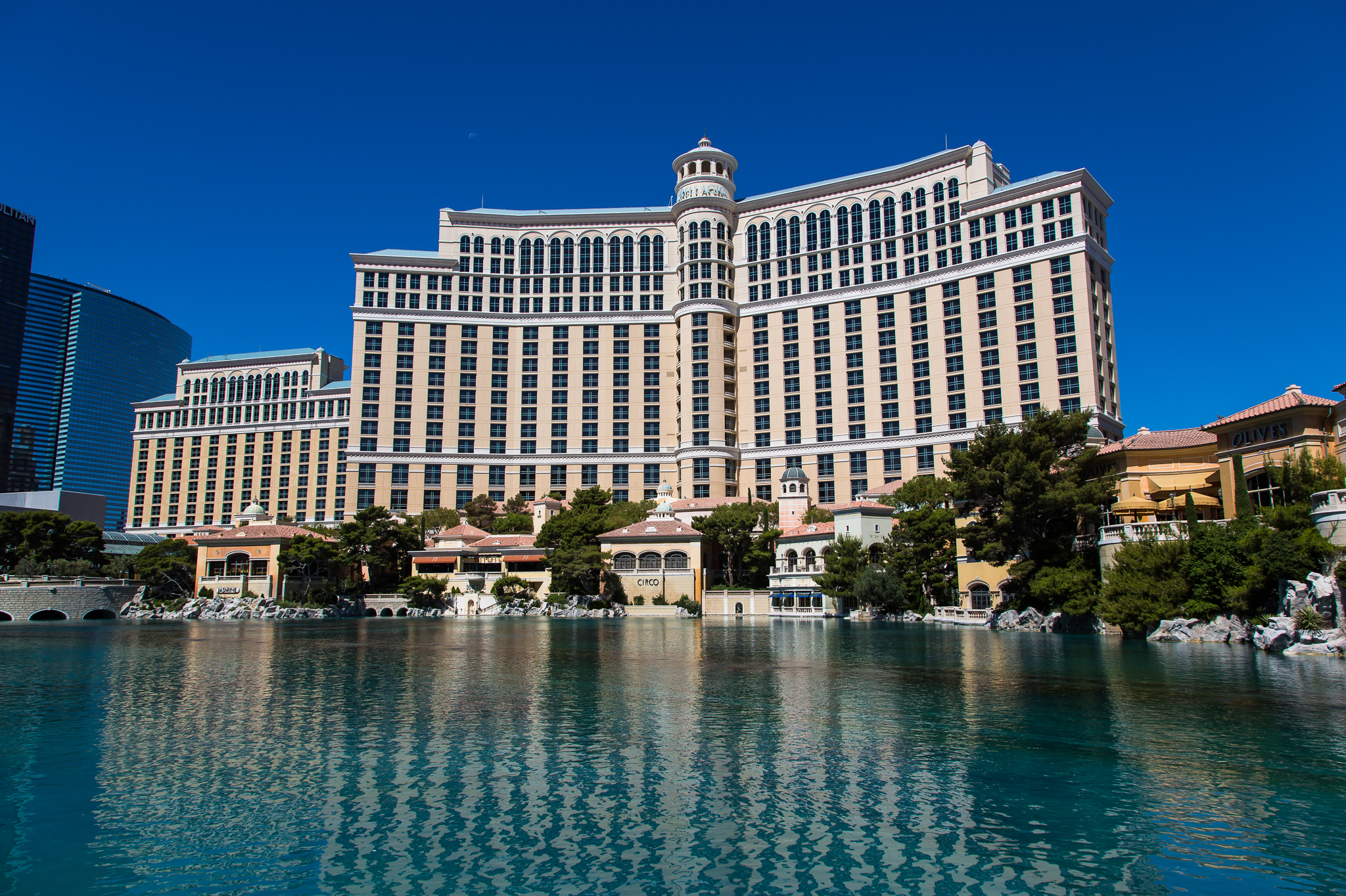 Bellagio